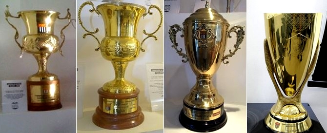 Troféus de algumas conquistas do "Campeonato do interior" promovido pela Federação Paulista de Futebol, vencidos pela Associação Atlética Ponte Preta.